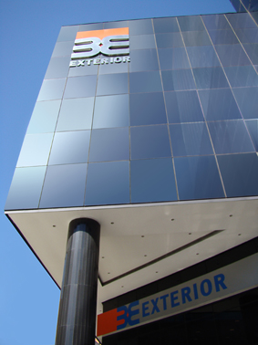 Sede Principal de Banco Exterior